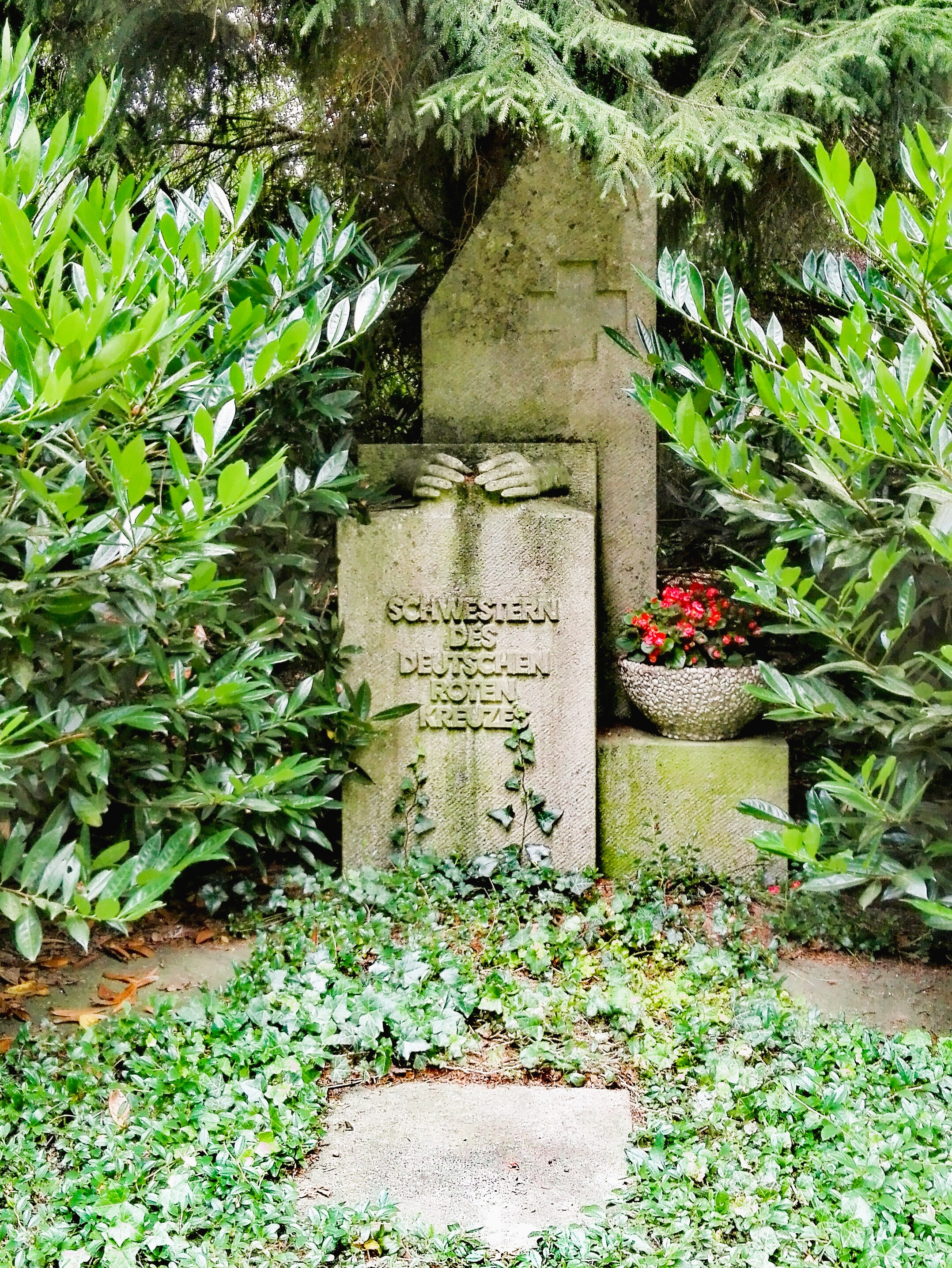 In Anlehnung an das von der Oberin Ottilie Schäfer 1939 erworbene und aufgestellte Grabmal der Lübeckischen Schwesternschaft vom Deutschen Roten Kreuz von Georg Kolbe erschaffenes Grabmal auf dem jetzt genutzten Block 28.